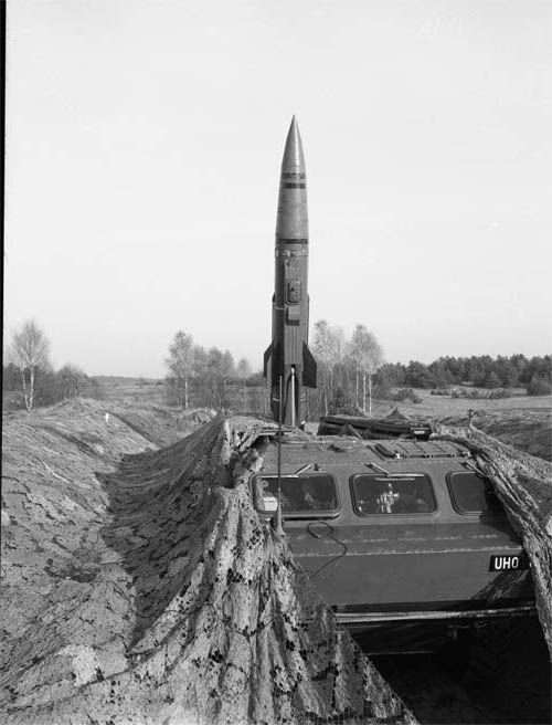 Pierwszy start Toczki w WP